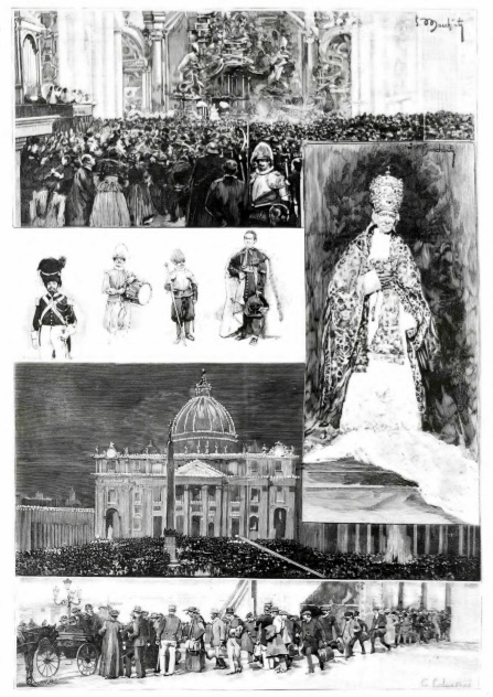 Peregrinación de obreros españoles a Roma. Peregrinos recibiendo la bendición apostólica en la Iglesia de San Pedro. Tipos de la guardia pontificia y camero secreto. Su Santidad León XIII. Iluminación de la Iglesia y Plaza de San Pedro. Llegada de los peregrinos a Roma.